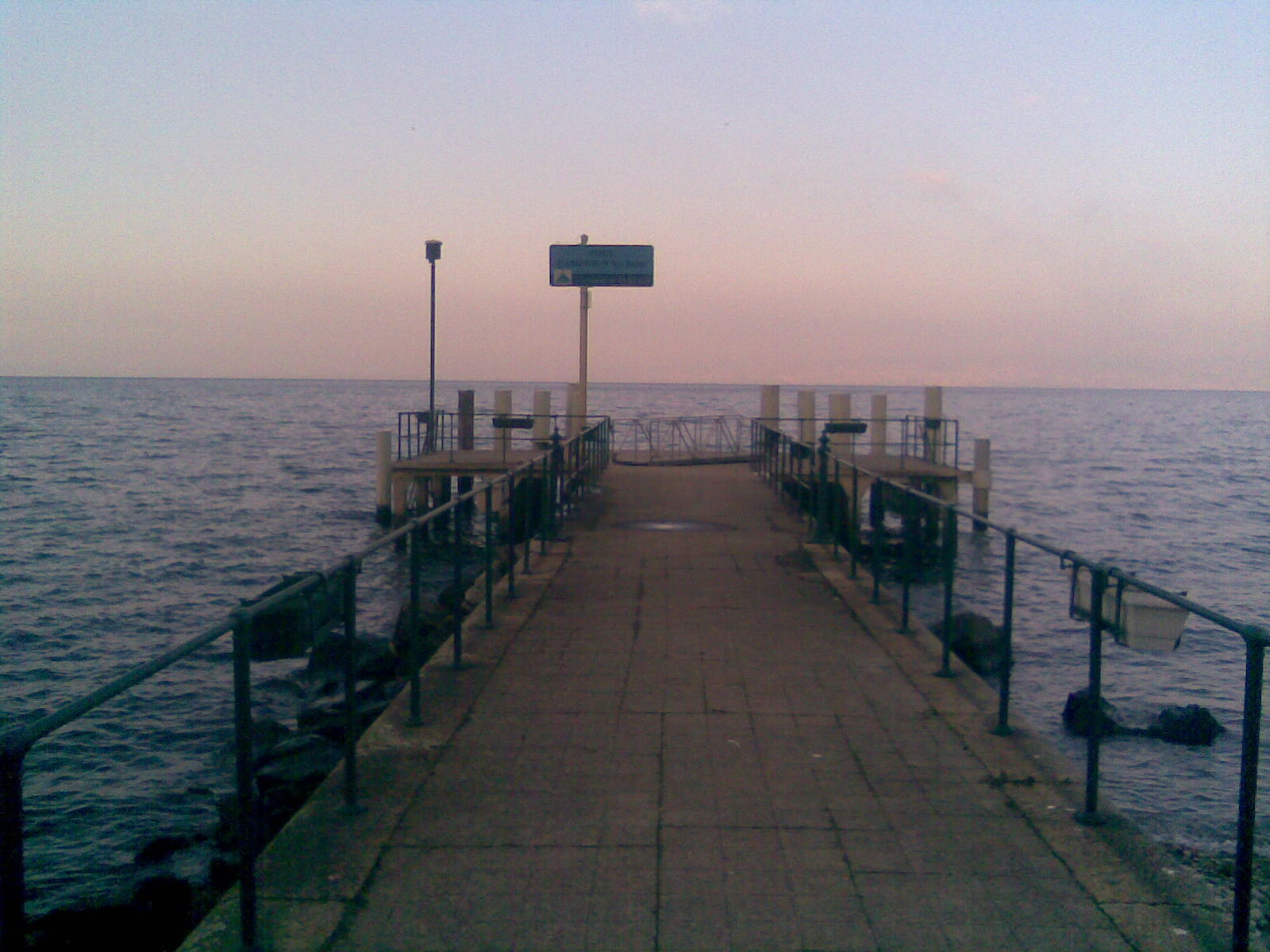 Embarcadère d'Amphion-les-bains, sur le lac léman, desservi par la CGN (compagnie générale de navigation)